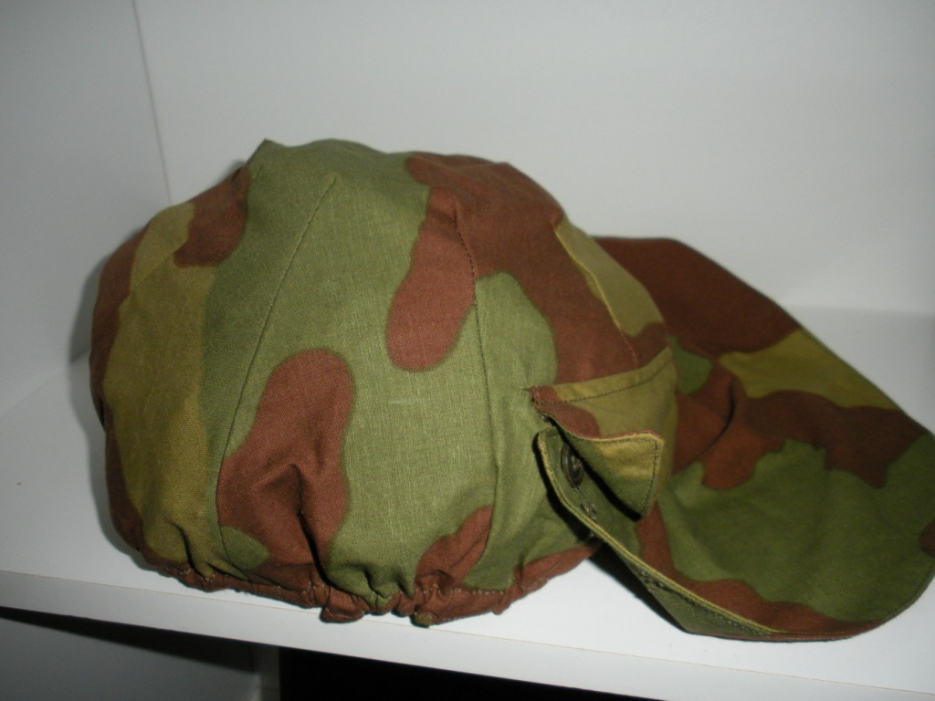 Telino per elmetto italiano M33, post bellico da paracadutista.